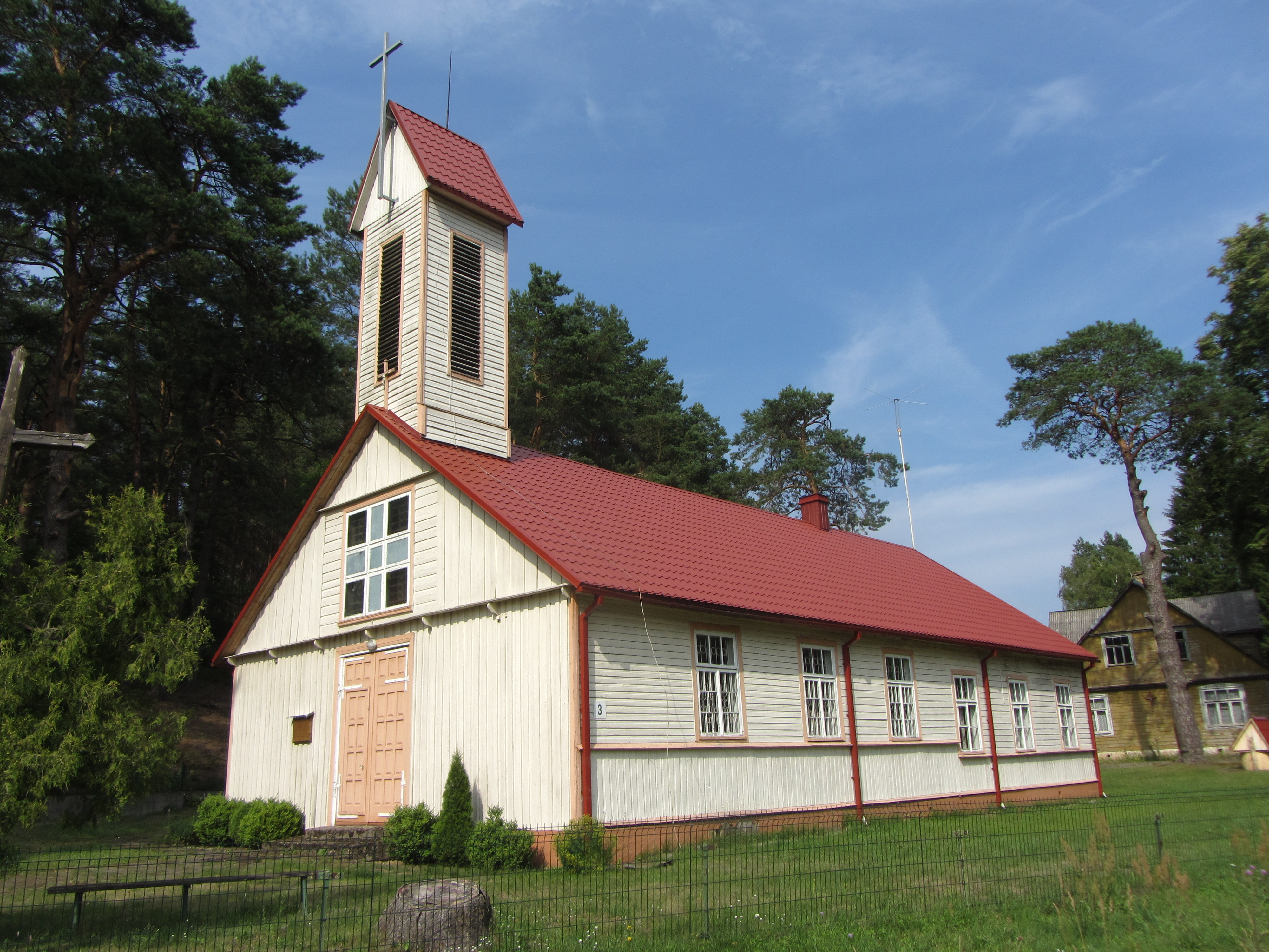 Lipliūnai, Lithuania